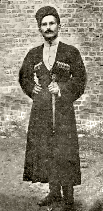 ალექსანდრე სვანიძე - ჰალეს უნივერსიტეტის სტუდენტი